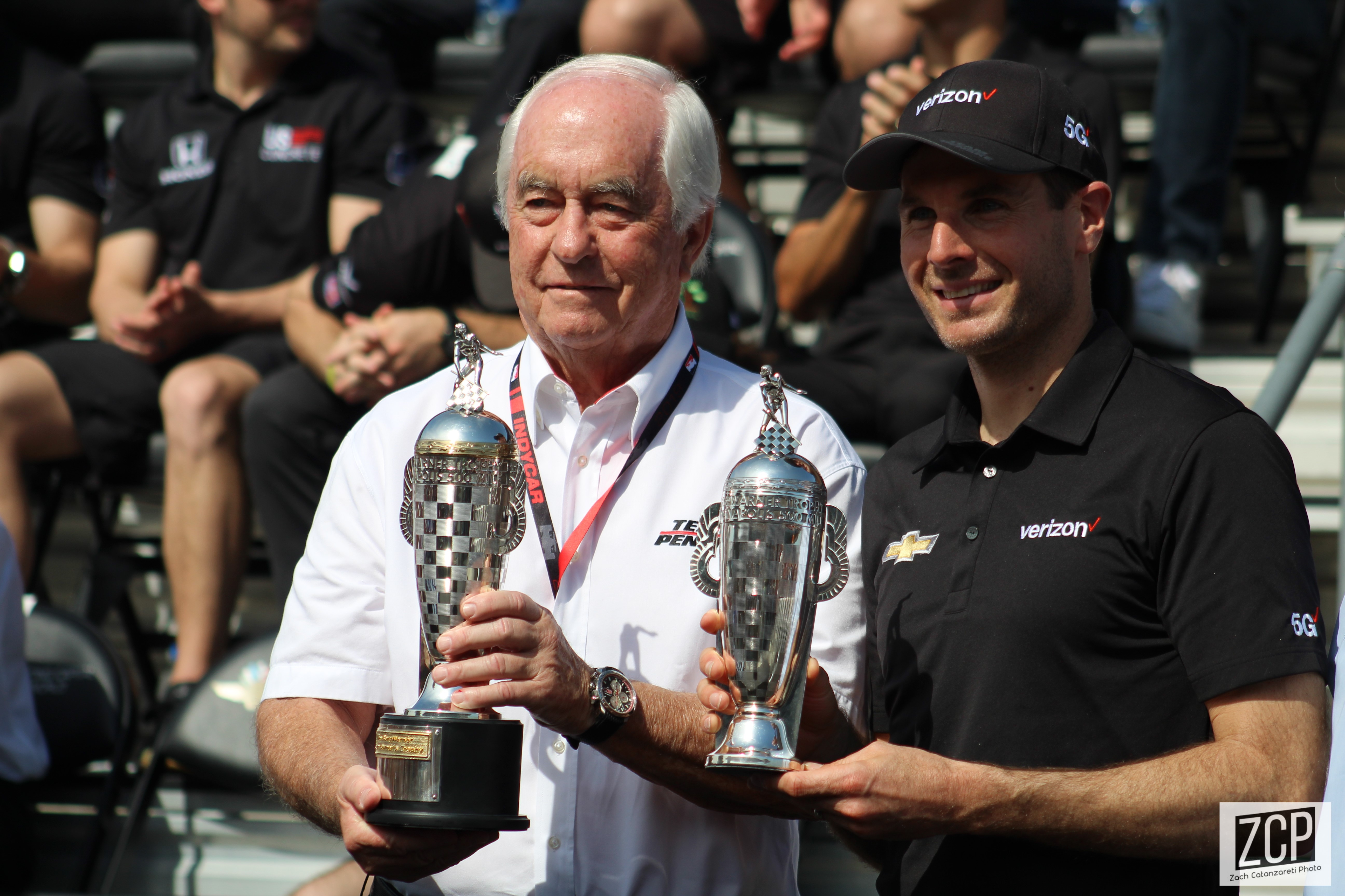 2019 Indianapolis 500